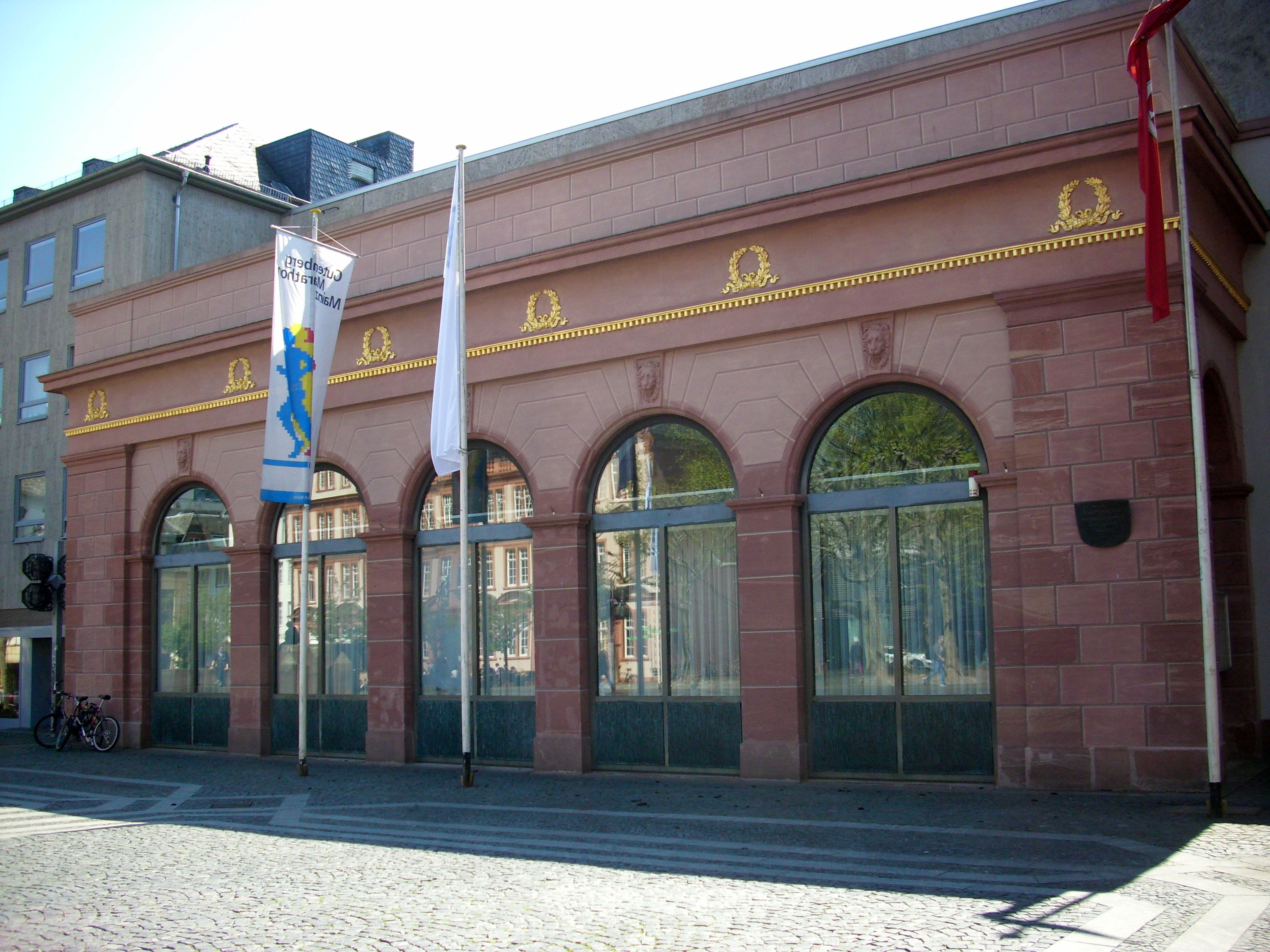 Ehemalige Preußische Hauptwache, heute Haus am Dom; kubisch aufgebaute Pfeilerarkatur, 1829